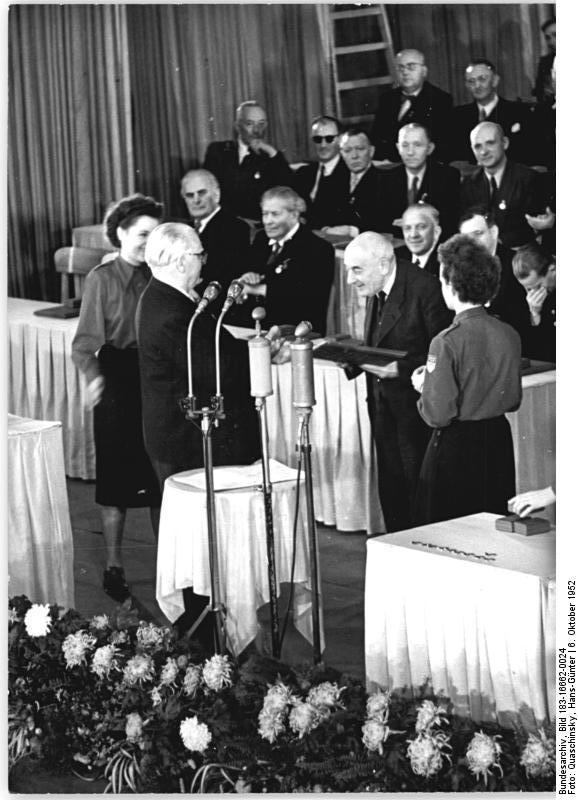 ADN-ZB-Quasch. 6.10.1952-Go-Berlin: Auf einem Staatsakt, in der Deutschen Staatsoper verlieh Präsident Pieck die Nationalpreise 1952 für Wissenschaft, Technik, Kunst und Literatur. Prof. Dr. Victor Klemperer erhielt den Nationalpreis III. Klasse.